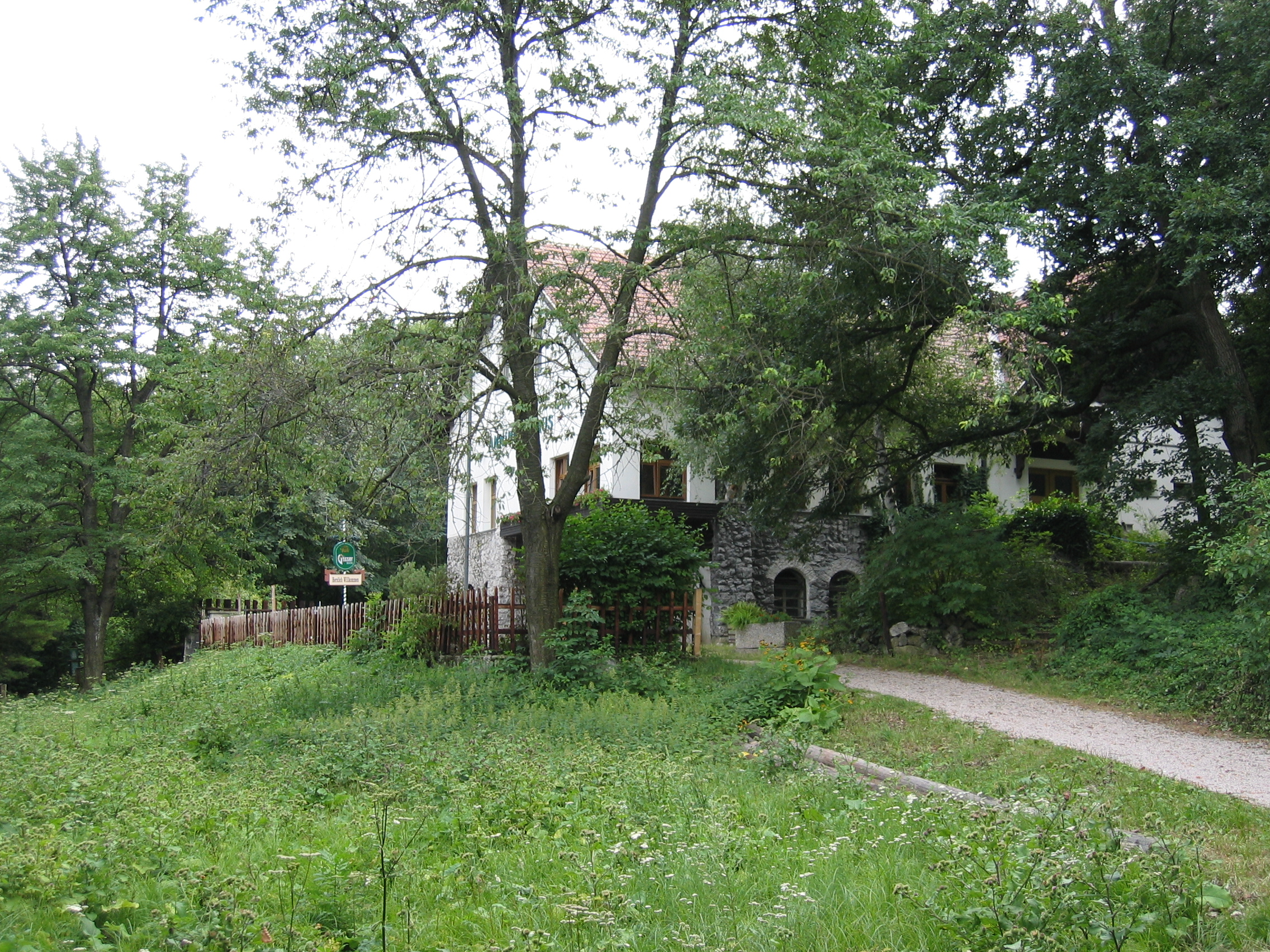 Anninger Schutzhütte